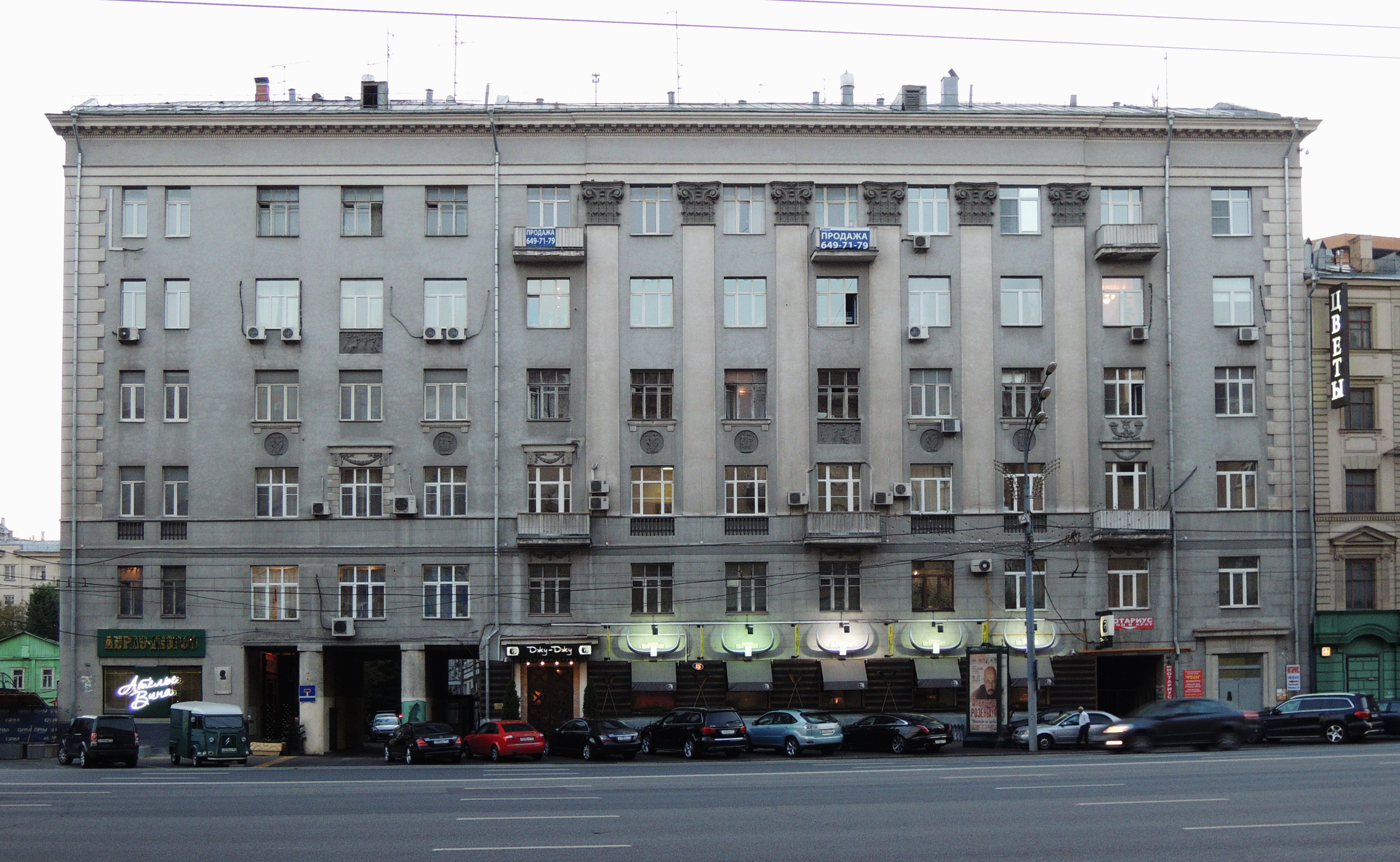 Смоленский бульвар